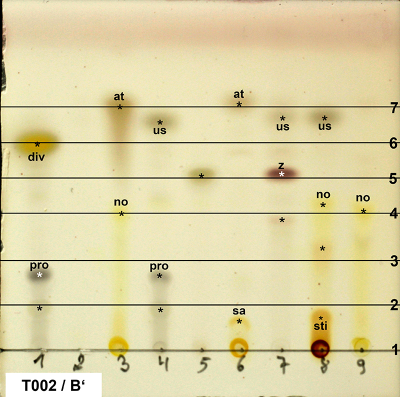 Dünnschichtchromatographie von Flechteninhaltsstoffen